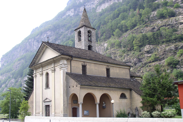 Chiesa dei Santi Innocenti a Pollegio